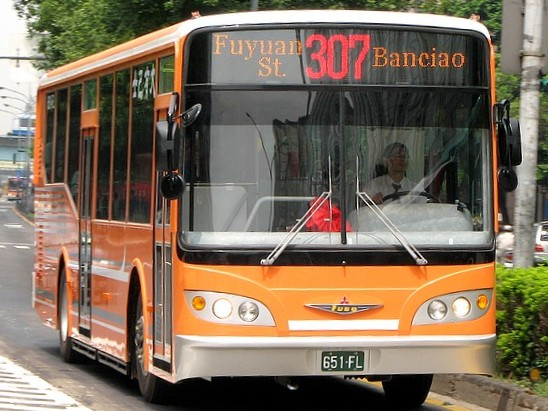 大有巴士 307 651-FL